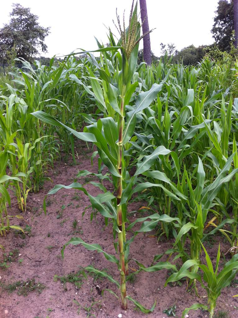 Rafle de maïs "Southern dent" teintée de rouge.